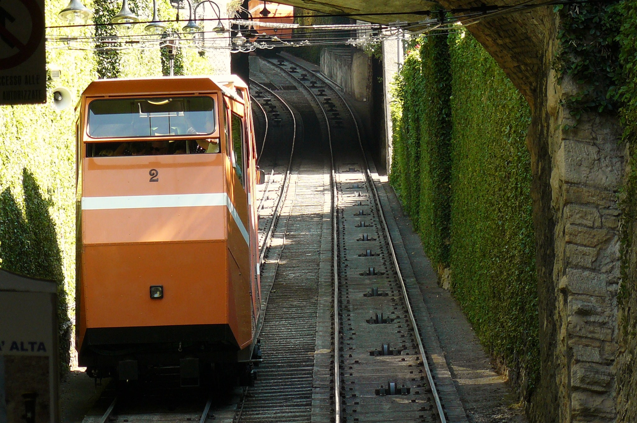 Funikular Bergamo Alta.